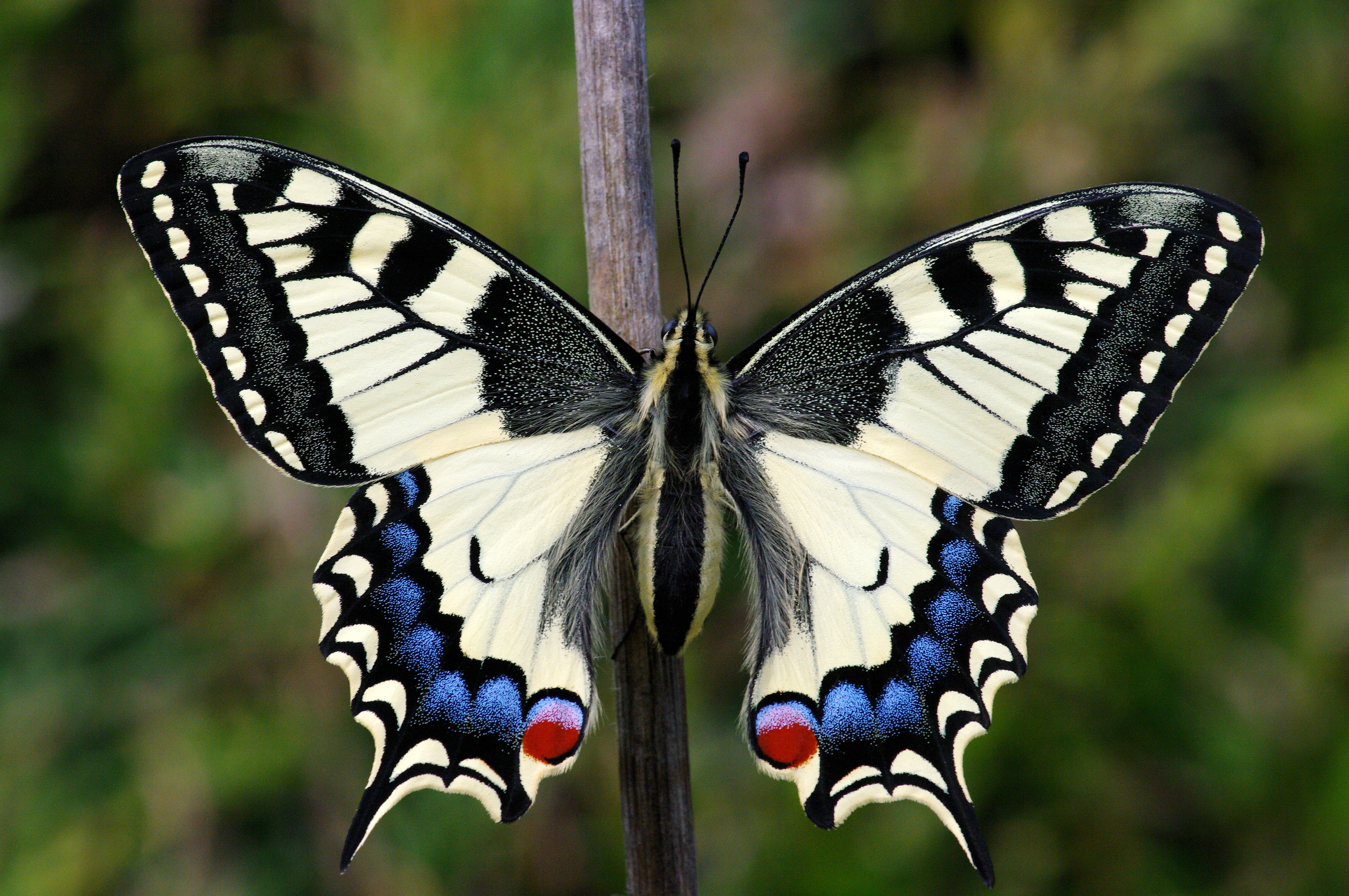 Imago Papilio machaon (le machaon), en Normandie.